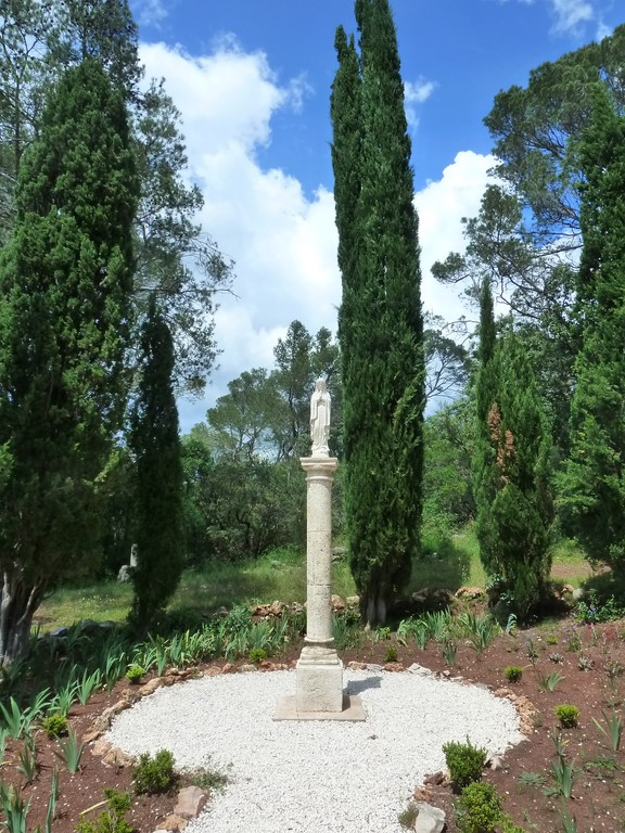 Sanctuaire Notre-Dame-du-Glaive, Cabasse, France